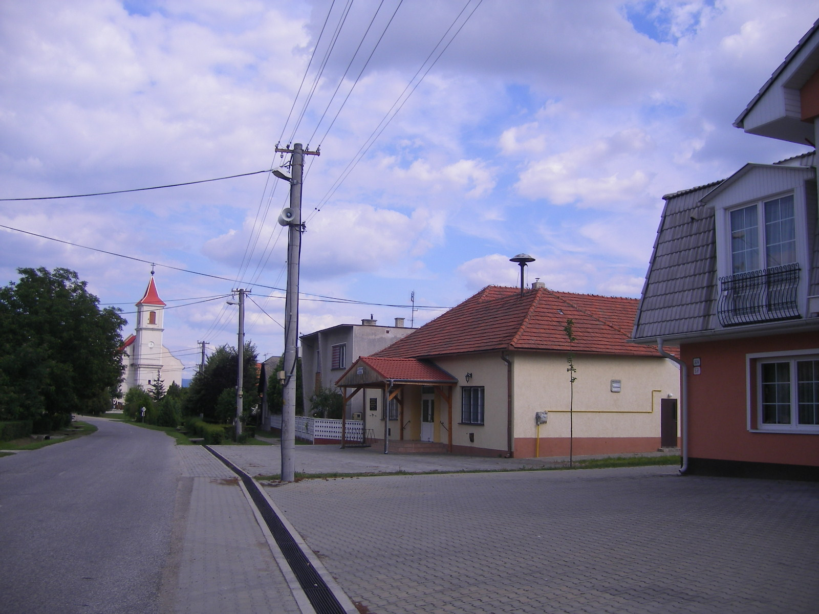 Ebed - utcakép